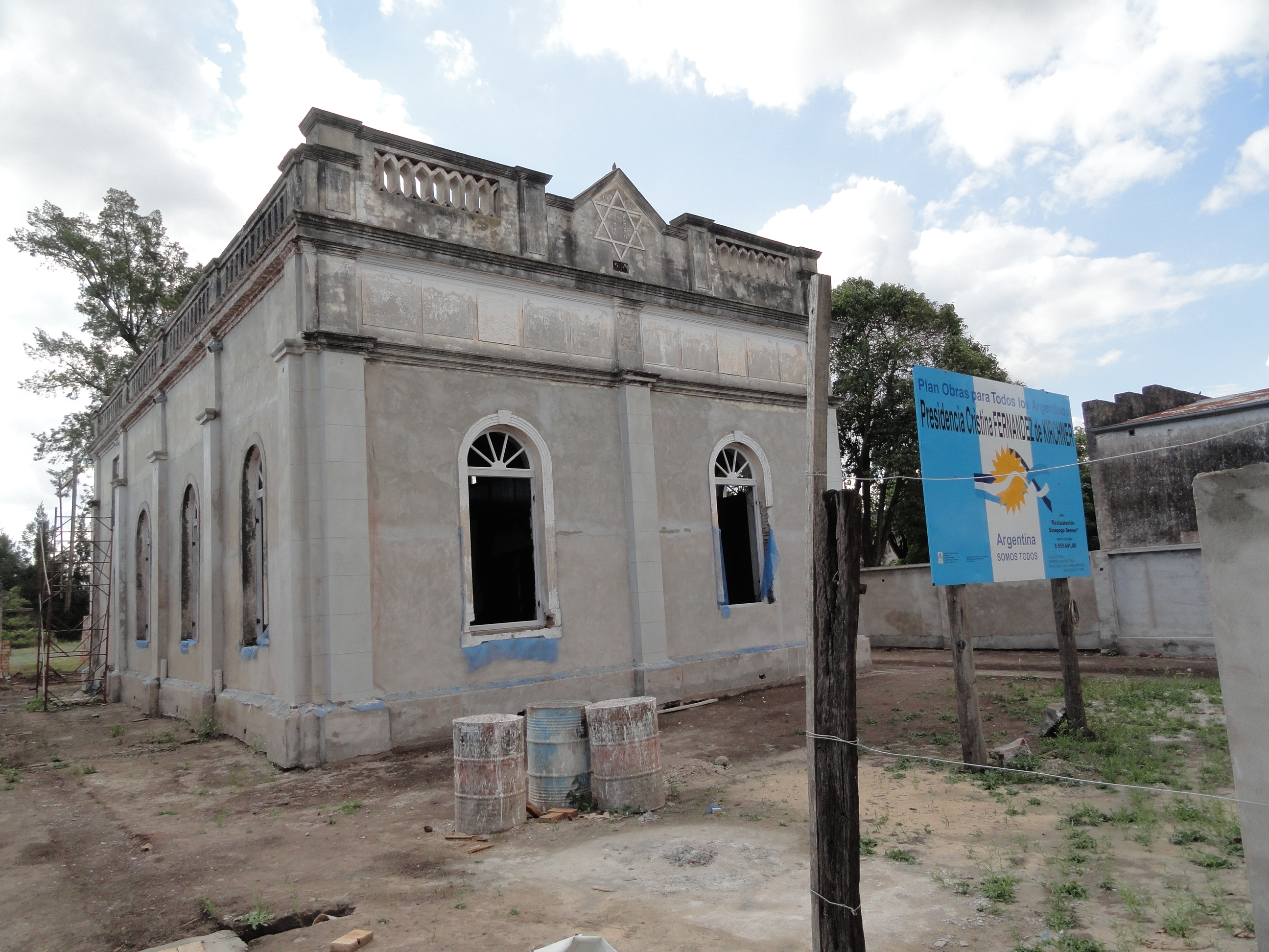 Synagogue Brenner, built in 1905. Moisés Ville, Argentina